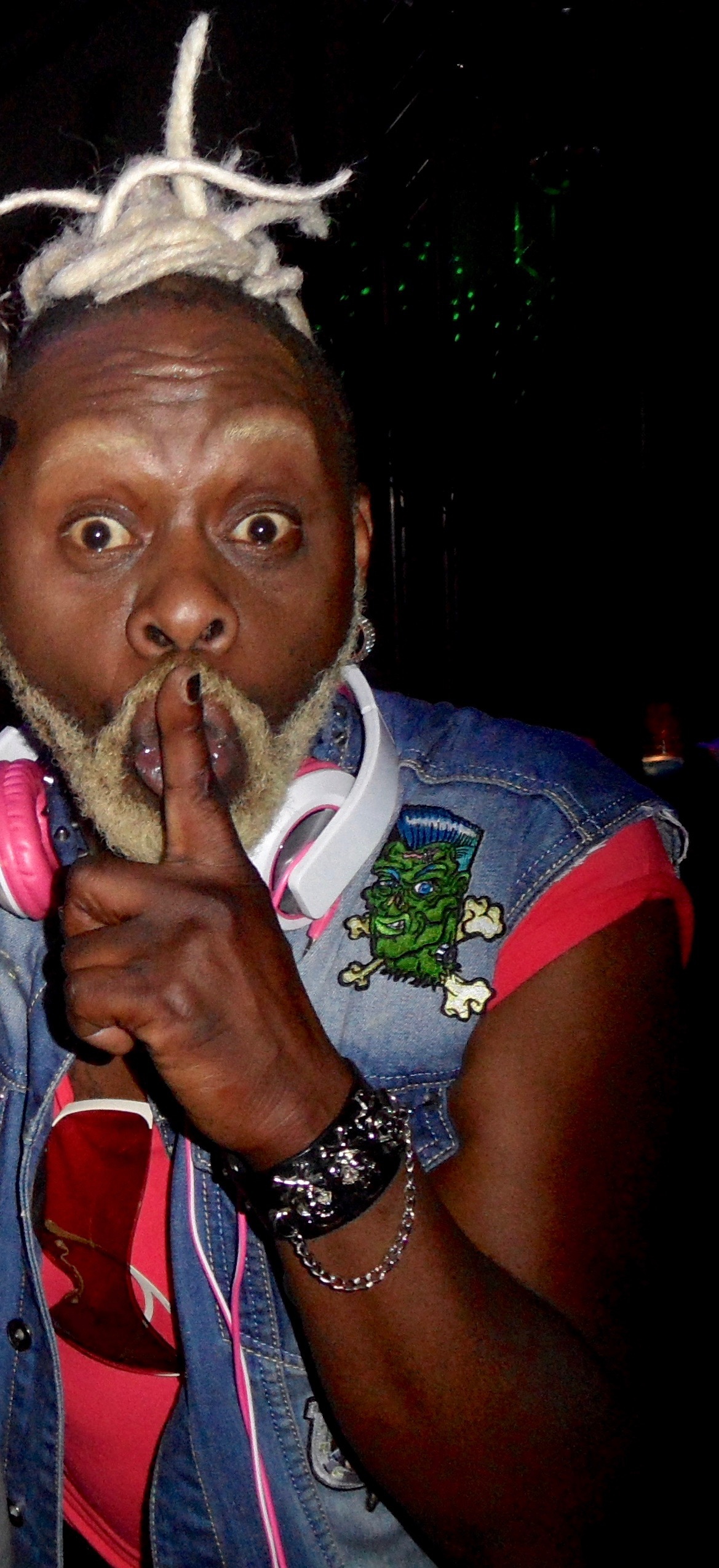 Jim Reeves in Bremen (2014)